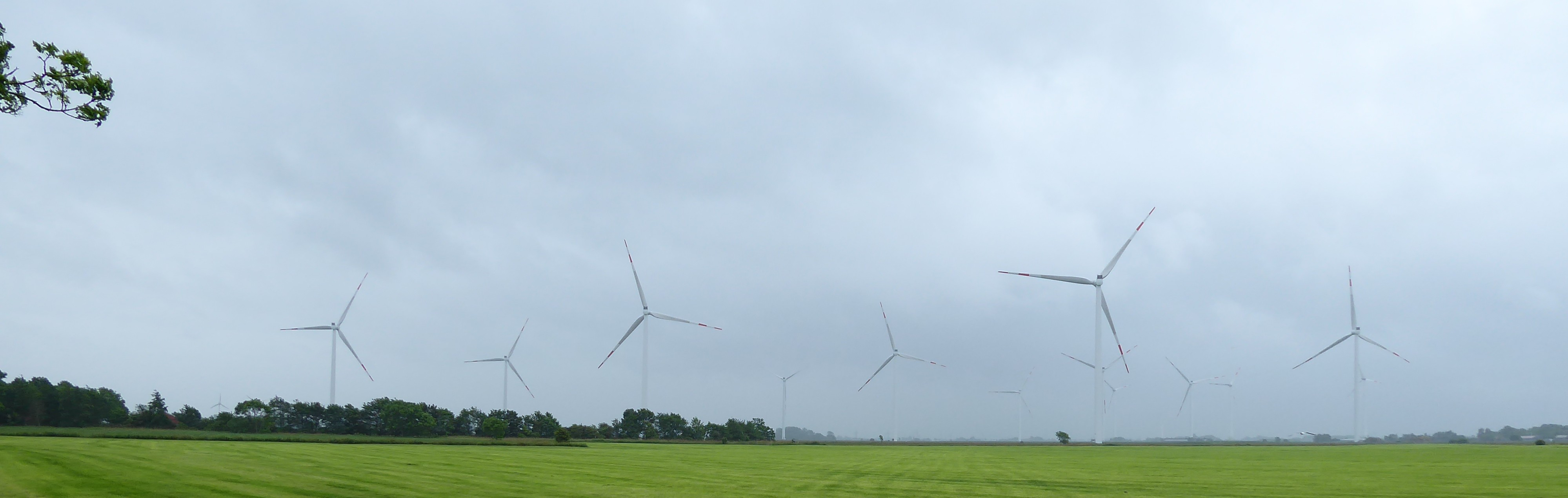 Ausschnitt des Windparks Bassens im Wangerland nach dem Repowering.